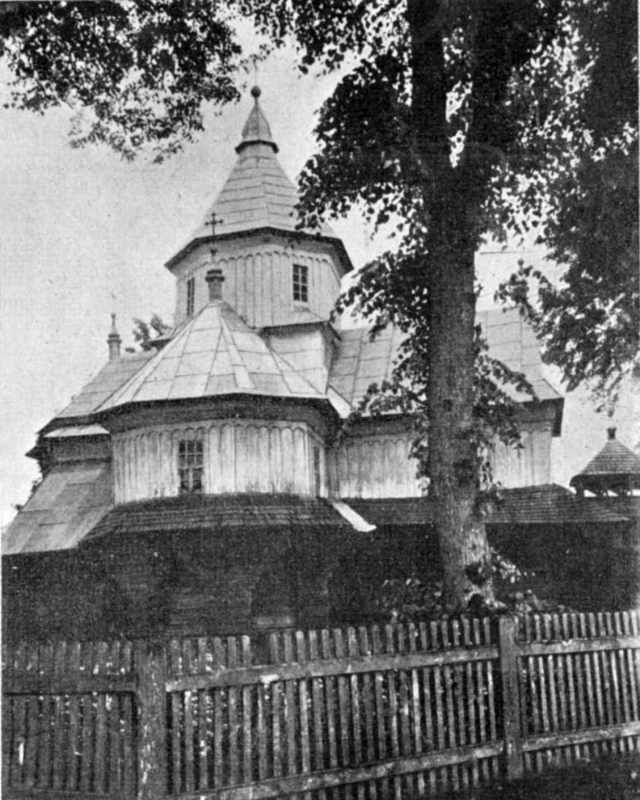 Nyzhnje_SynovydneS_Cerk_Uspinnja